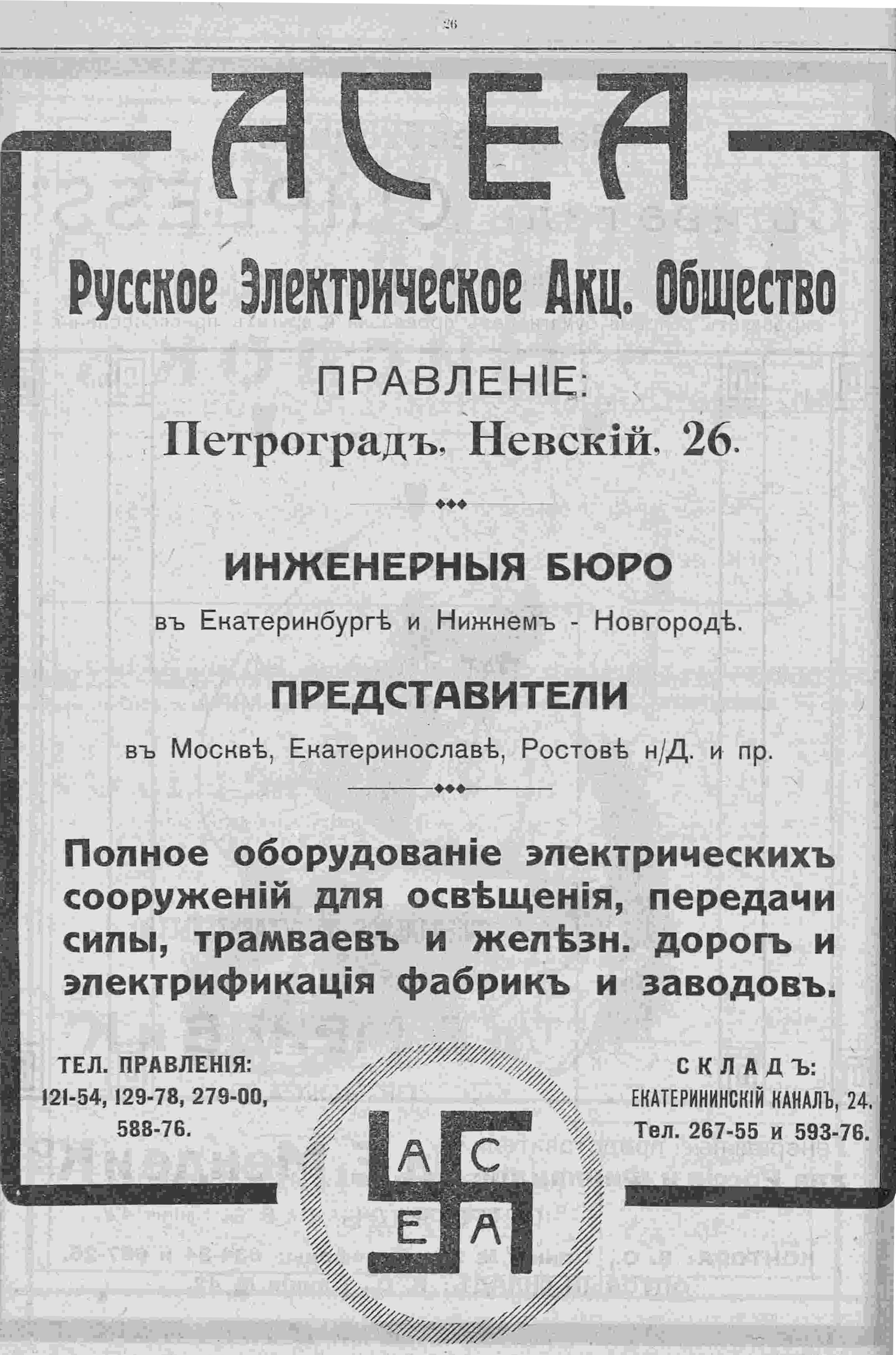 Логотип компании АСЕА в виде свастики, "Весь Петроград", 1917 год